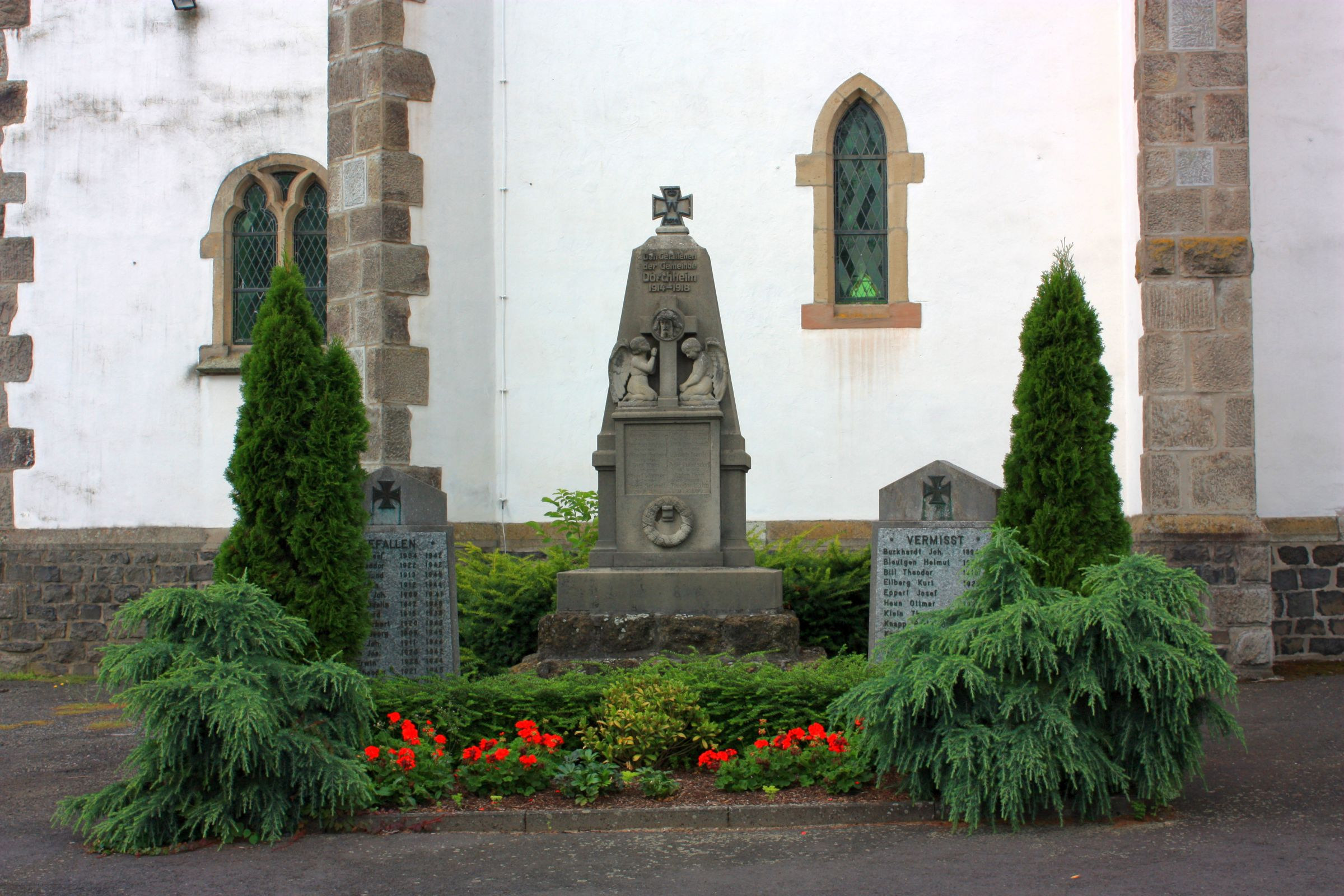 Ehrenmal an der Kirche in Dorchheim, Hessen, für die Gefallenen der Weltkriege